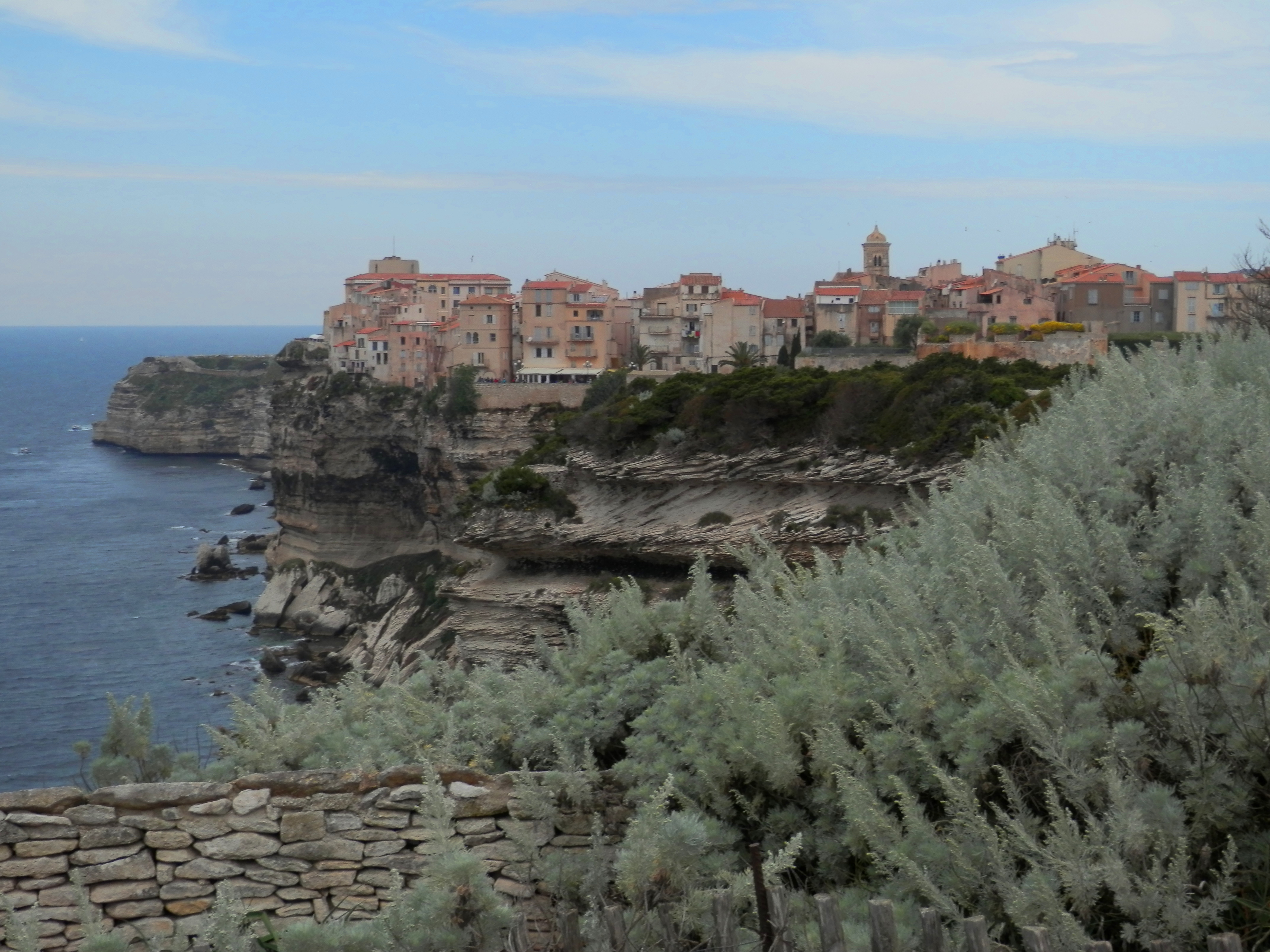 Corsu: Vista di Bunifaziu